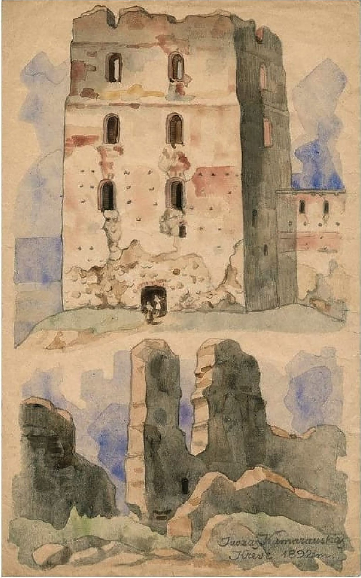 Беларуская (тарашкевіца): Крэва (Kreva). Замак